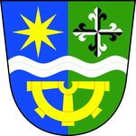 znak obce Radkovy